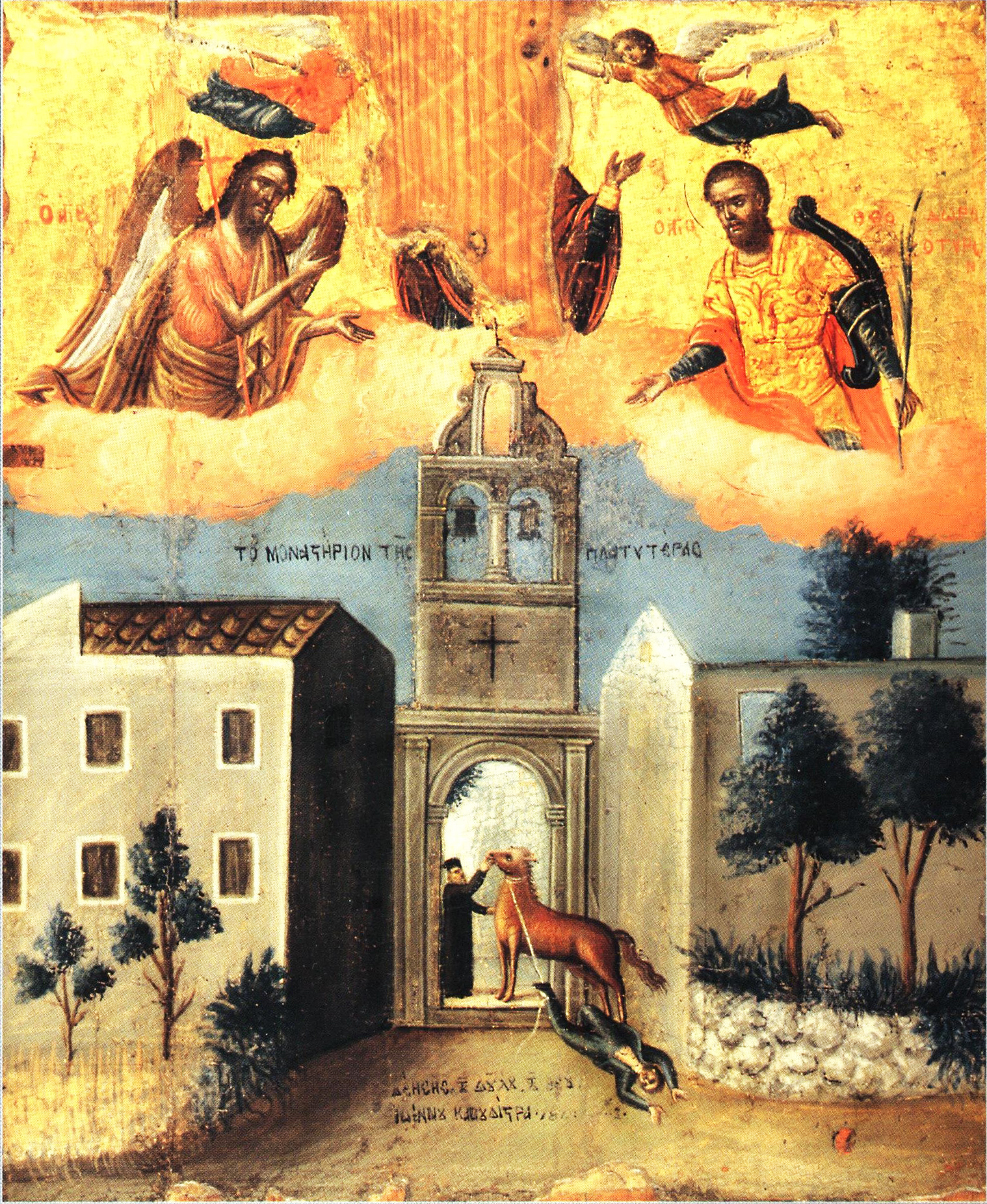 Чудо, происшедшее с графом Иоанном Антоновичем Каподистрией близ Монастыря Платитера (Керкира). Икона, XIX век, хранится в монастыре Платитера. Вверху: в центре - Божия Матерь, написанная иконографическим типом Знамения (плохо сохранилась), справа от нее - Пророк Иоанн Предтеча, слева - великомученик Феодор Тирон